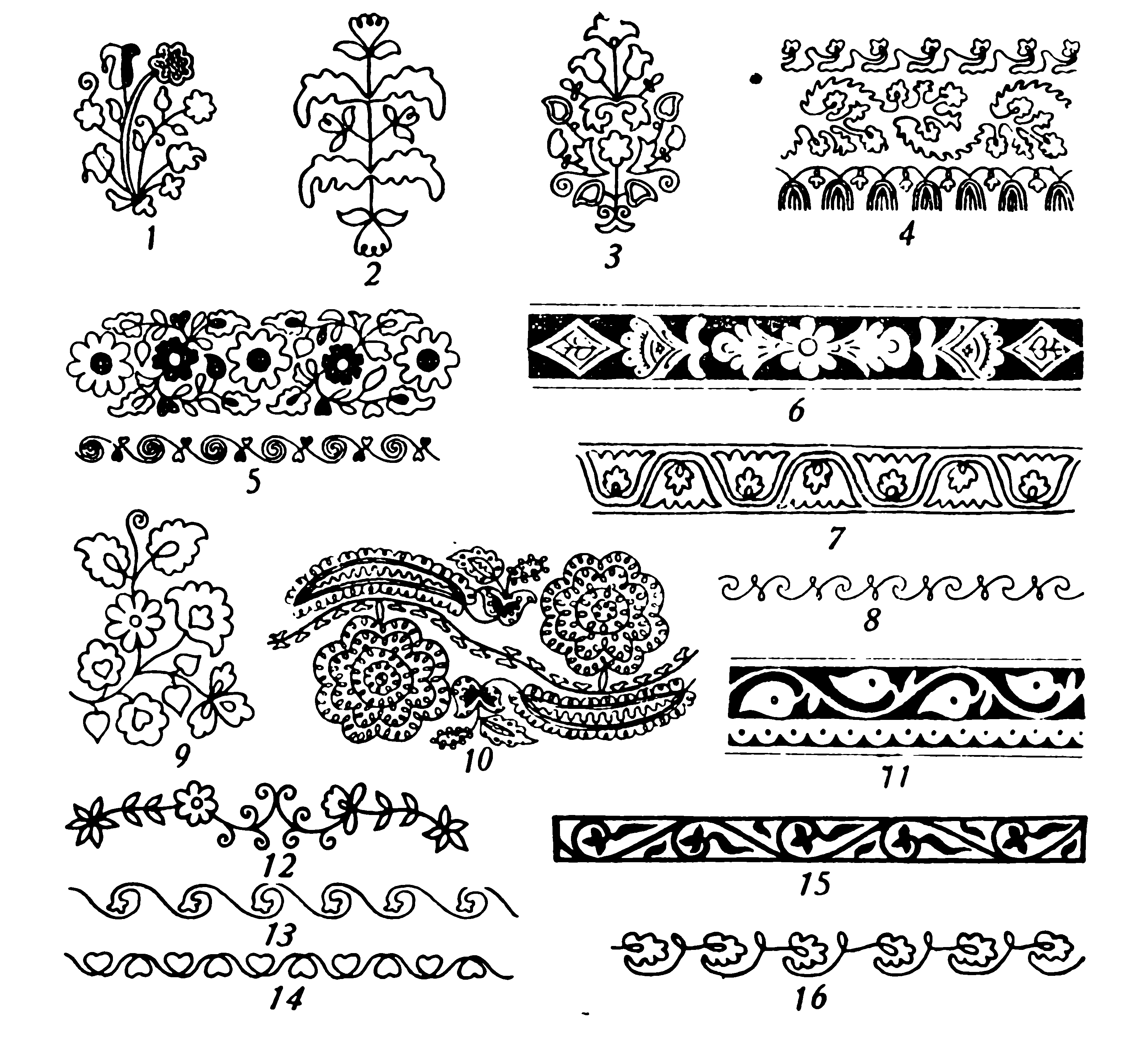 В третий орнаментальный комплекс входят растительные узоры как реалистические, так и стилизованные.